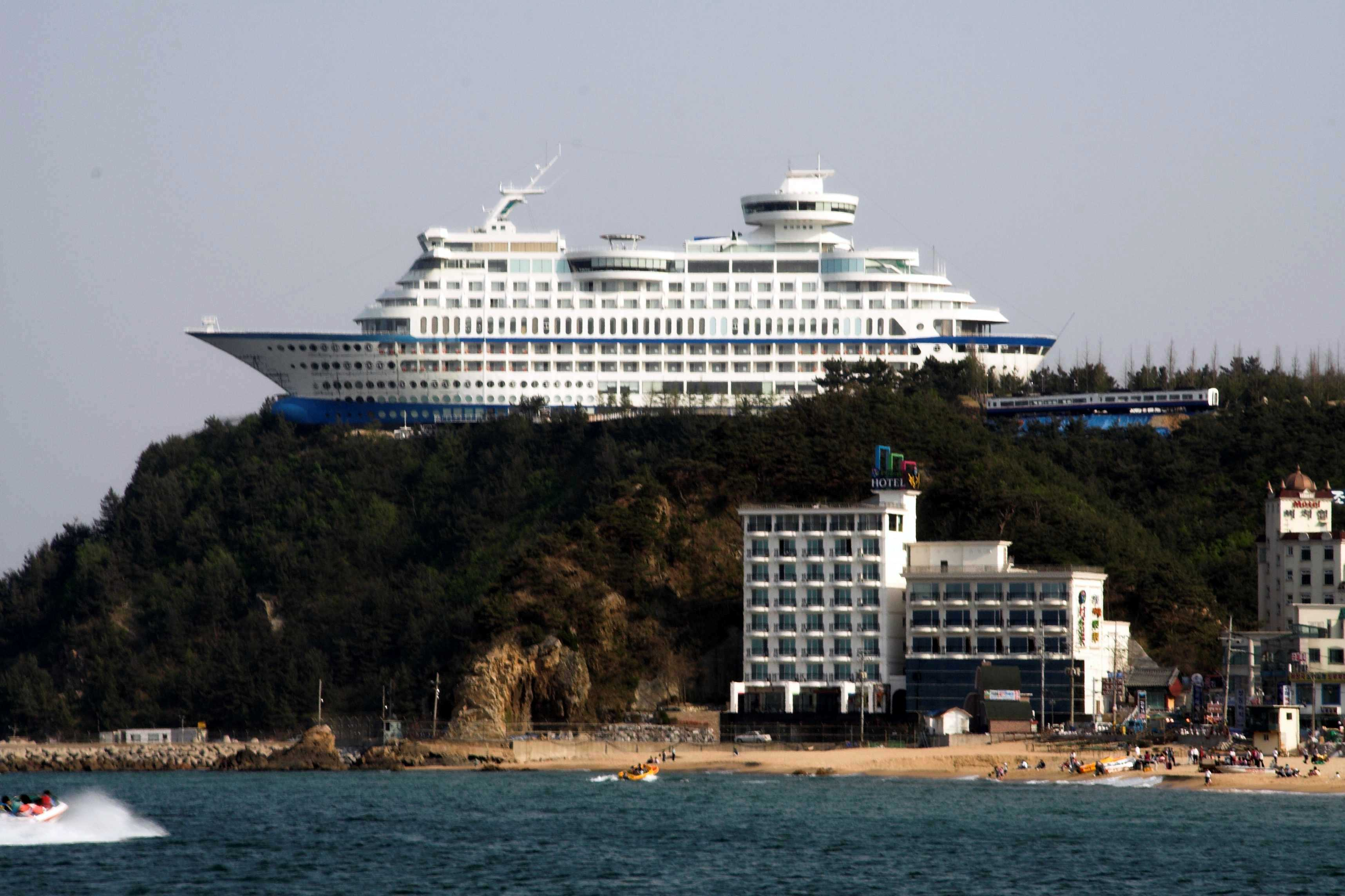 Korea, Gangneung, Jeongdongjin Sun Cruise Hotel